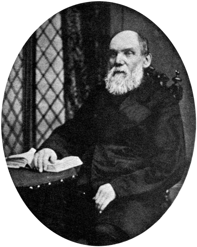 Robert George Gammage (1820-1888)